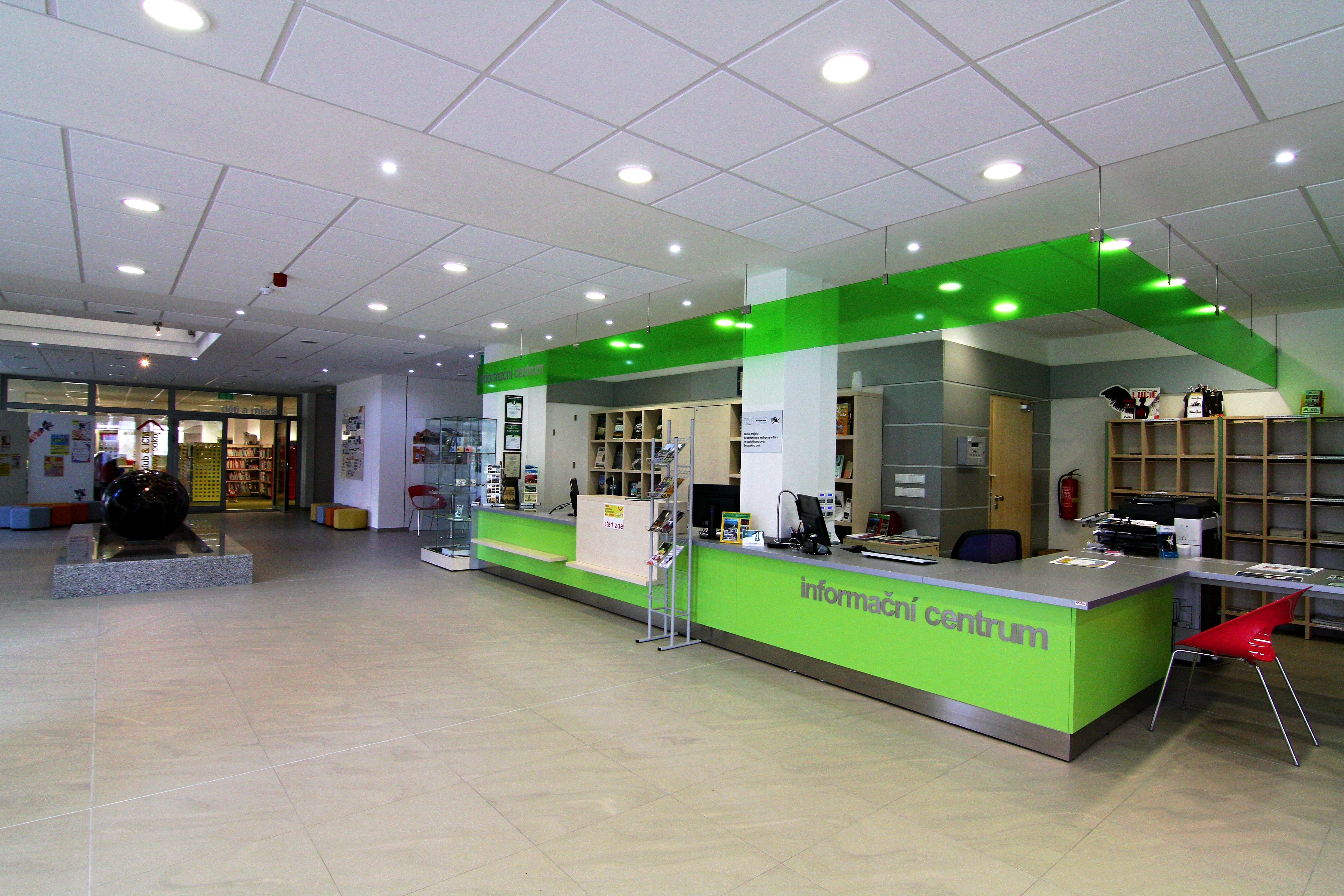 Oficiální promo fotografie Infocentra Třinec